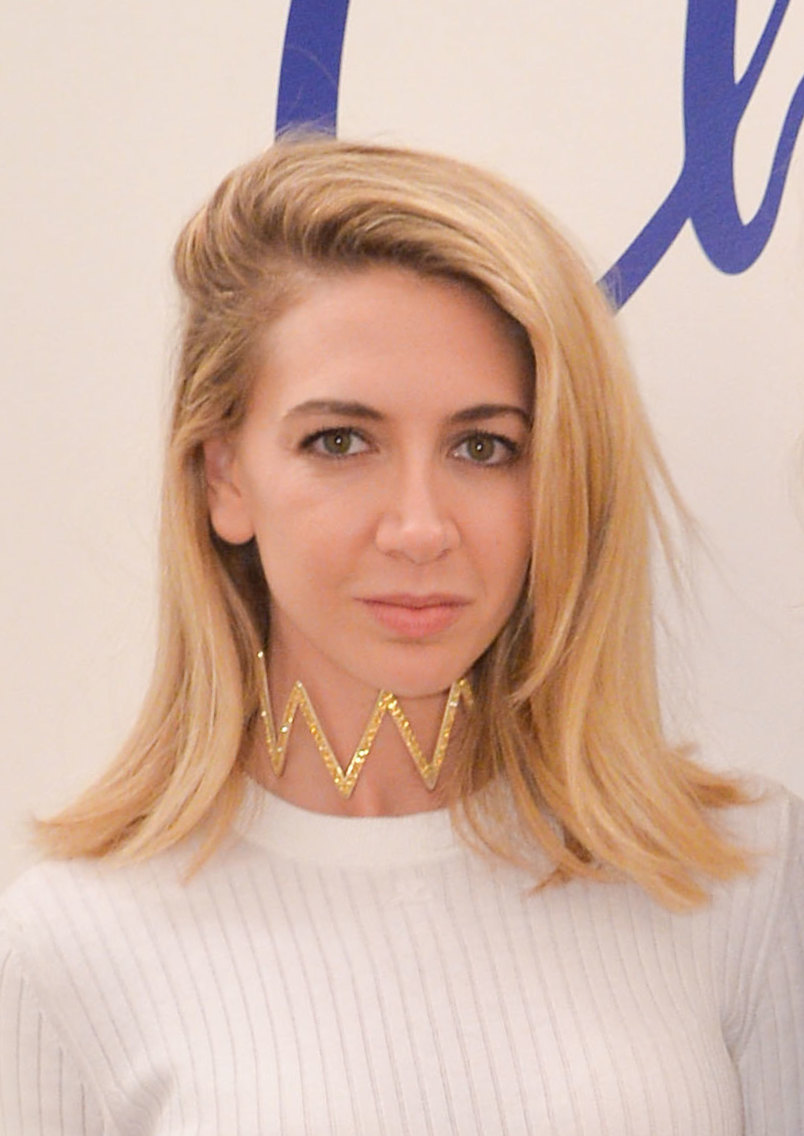 Sabine Getty, en 2016.